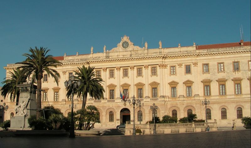 Sassari, Piazza d'Italia e Palazzo della Provincia.